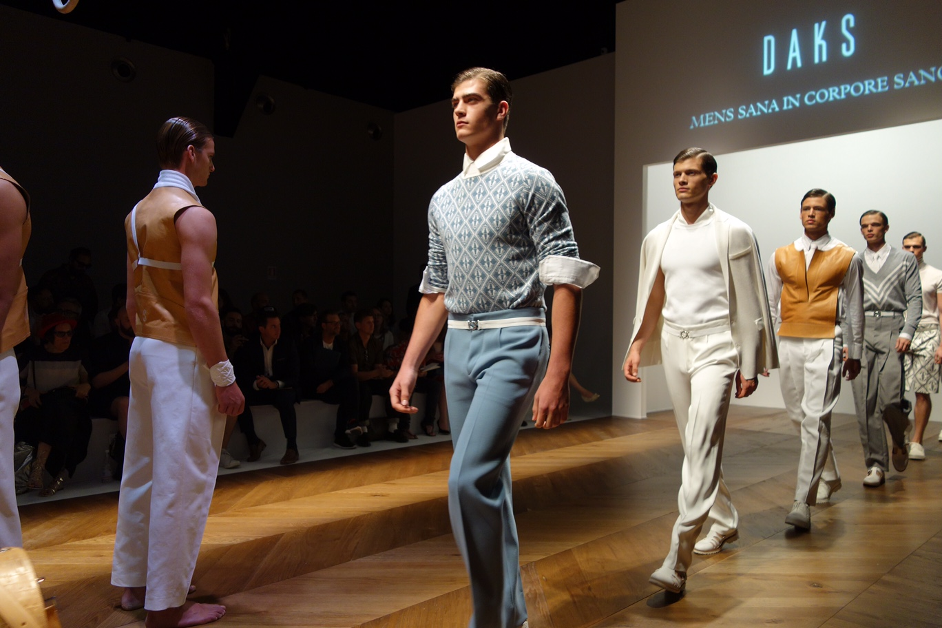 2015年6月21日にMilanにある「AREA SCIESA TRE」にて開催されましたDAKSミラノコレクションの様子を撮影